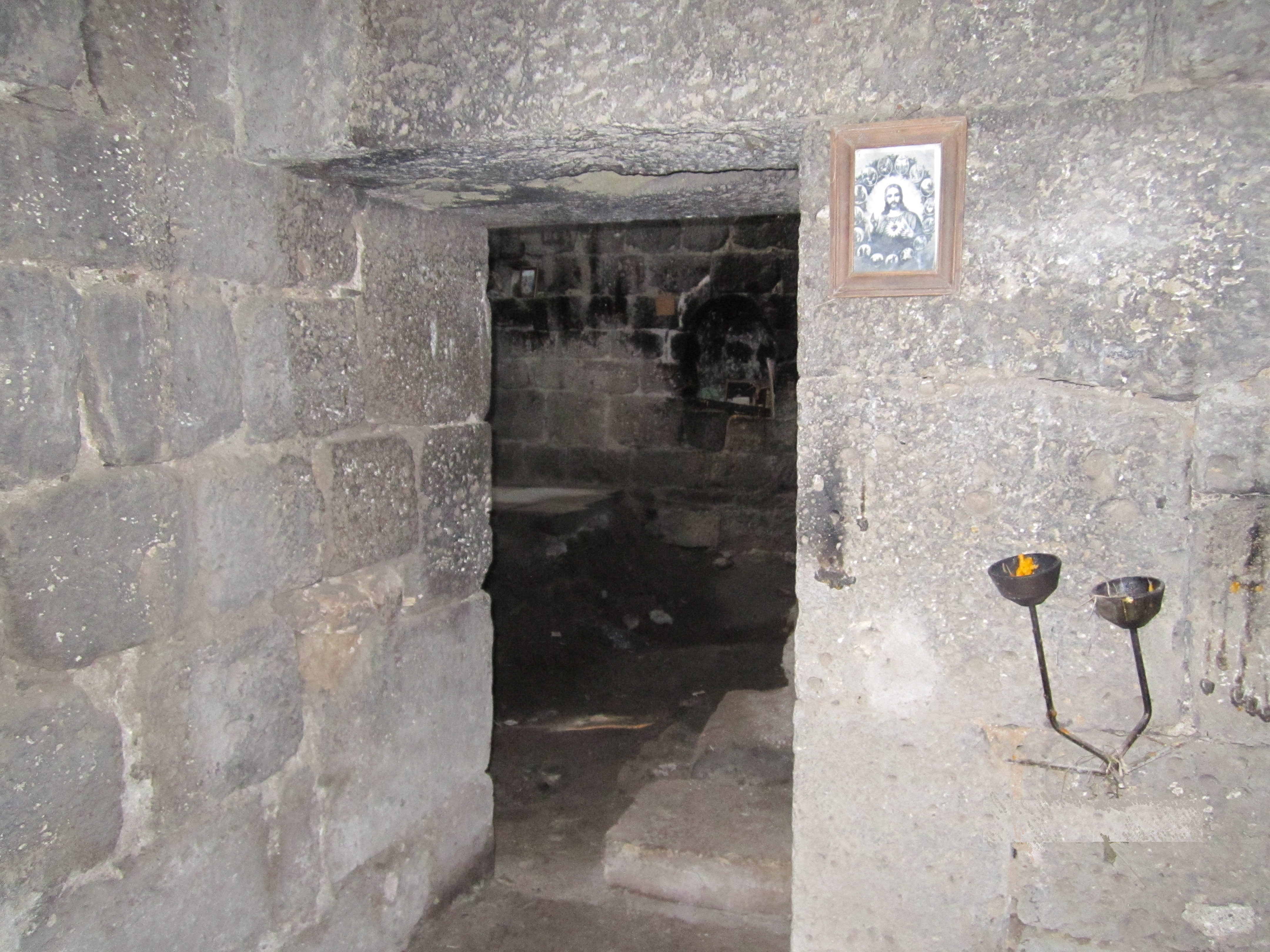 Կուրթան Սուրբ Աստվածածին եկեղեցի 57/7